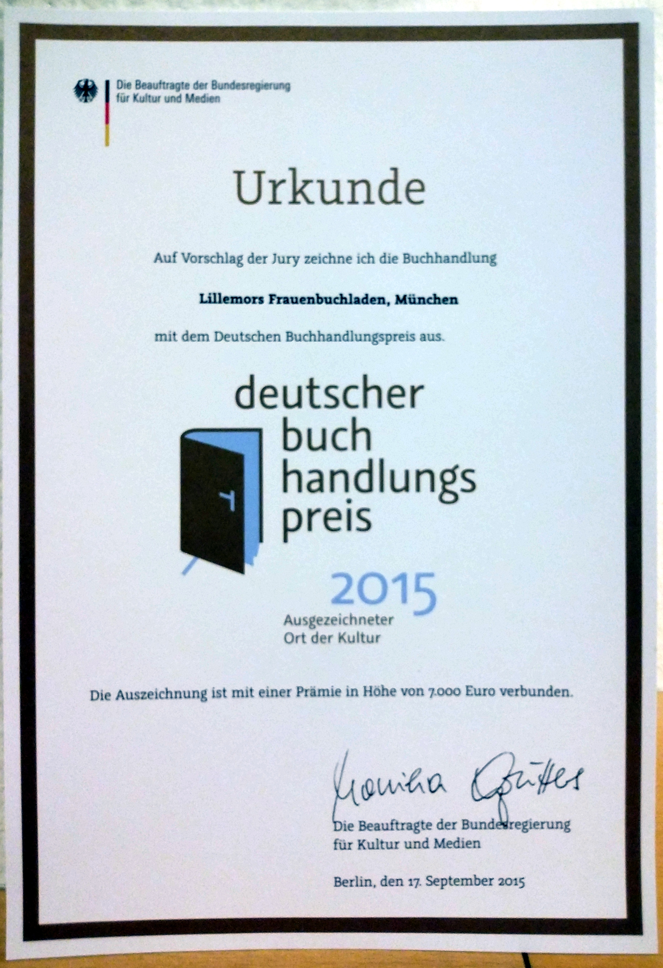 Urkunde Deutscher Buchhandlungspreis 2015 für Lillemors Frauenbuchladen München